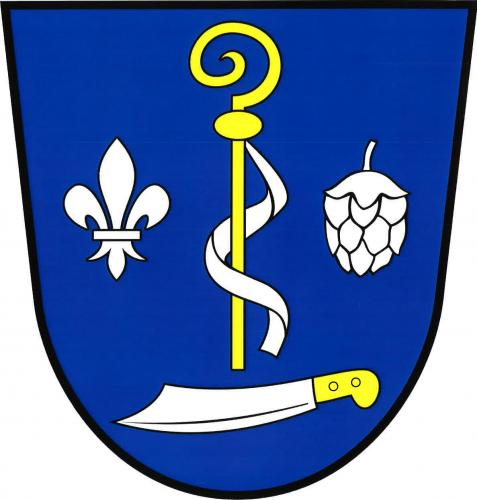 znak,Kvášňovice , okres Klatovy. "V modrém štítě zlatá berla ovinutá stříbrným sudariem, provázená vpravo lilií, vlevo svěšenou chmelovou šišticí, obojí stříbrné. Dole položený stříbrný nůž se zlatou rukojetí."